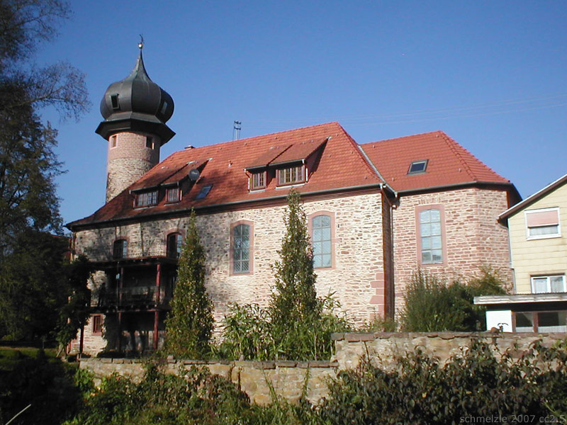 Alte kath. Kirche in Mosbach-Lohrbach, Baden-Württemberg, Deutschland. Entstand im 16. Jhd. als Zehntscheuer mit Turm nahe dem dortigen Wasserschloss, Kirche von 1763 bis 1966.